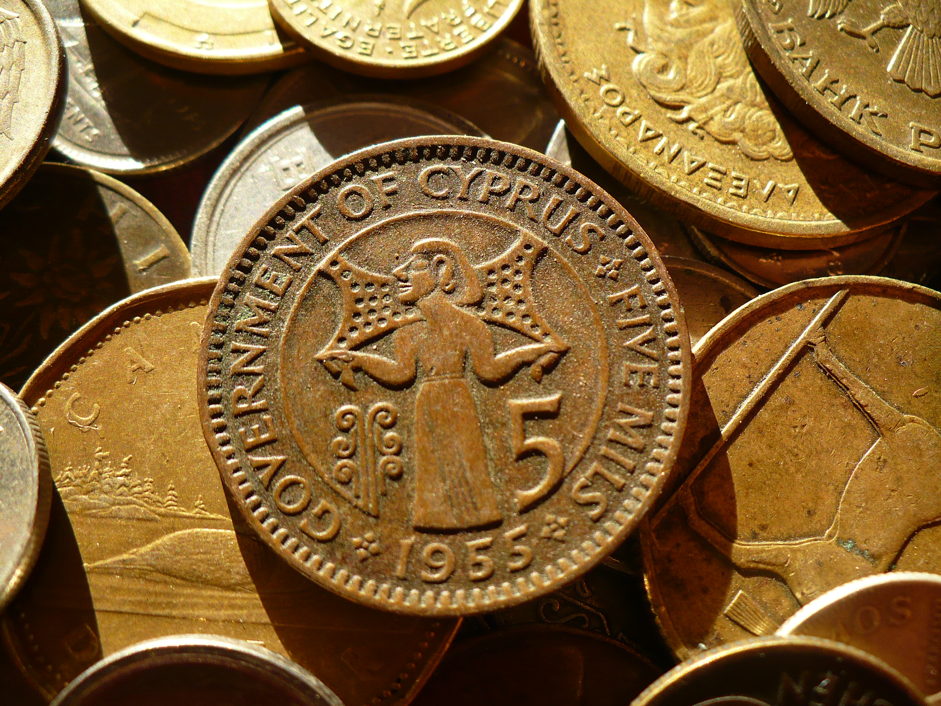 Bozuk paralar